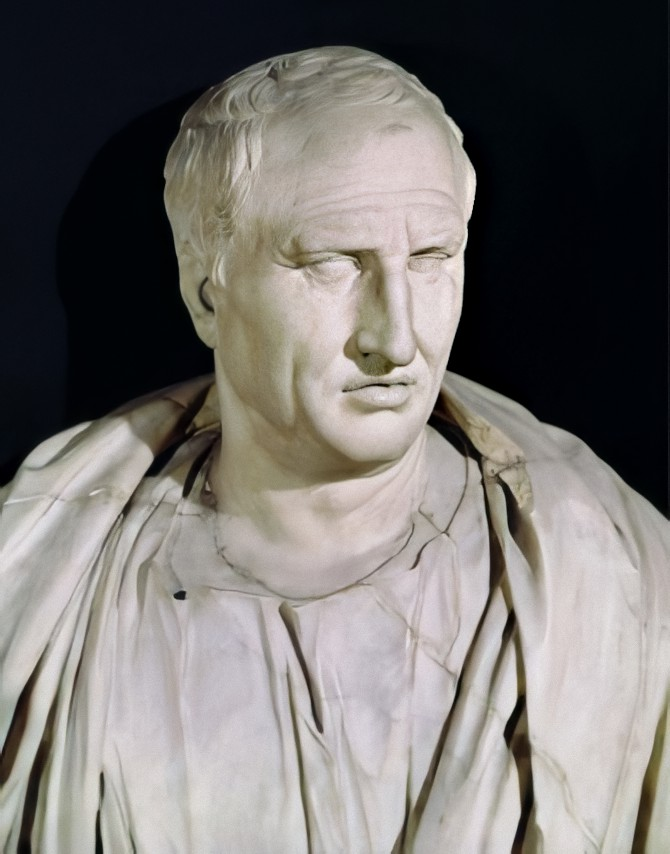 Marek Tuliiusz Cyceron, rzeźba z I wieku po Chrystusie. Muzeum Kapitolińskie.